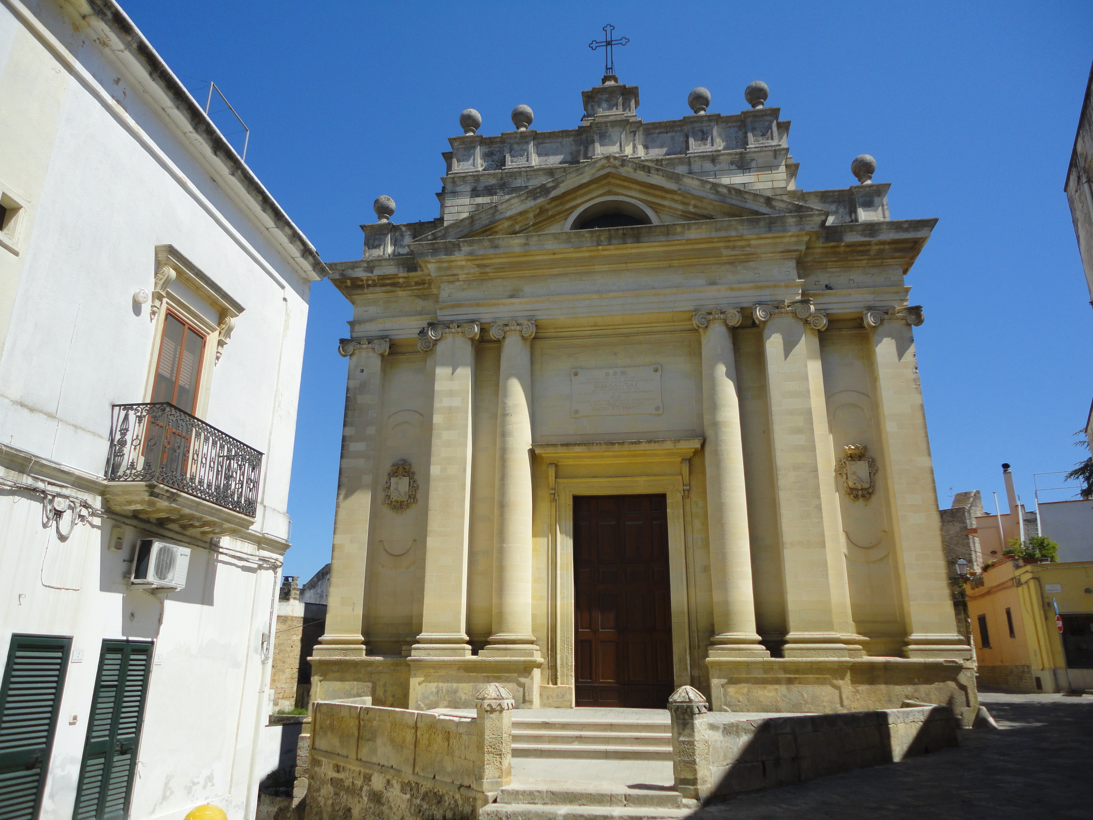 Chiesa Madre di Neviano Lecce